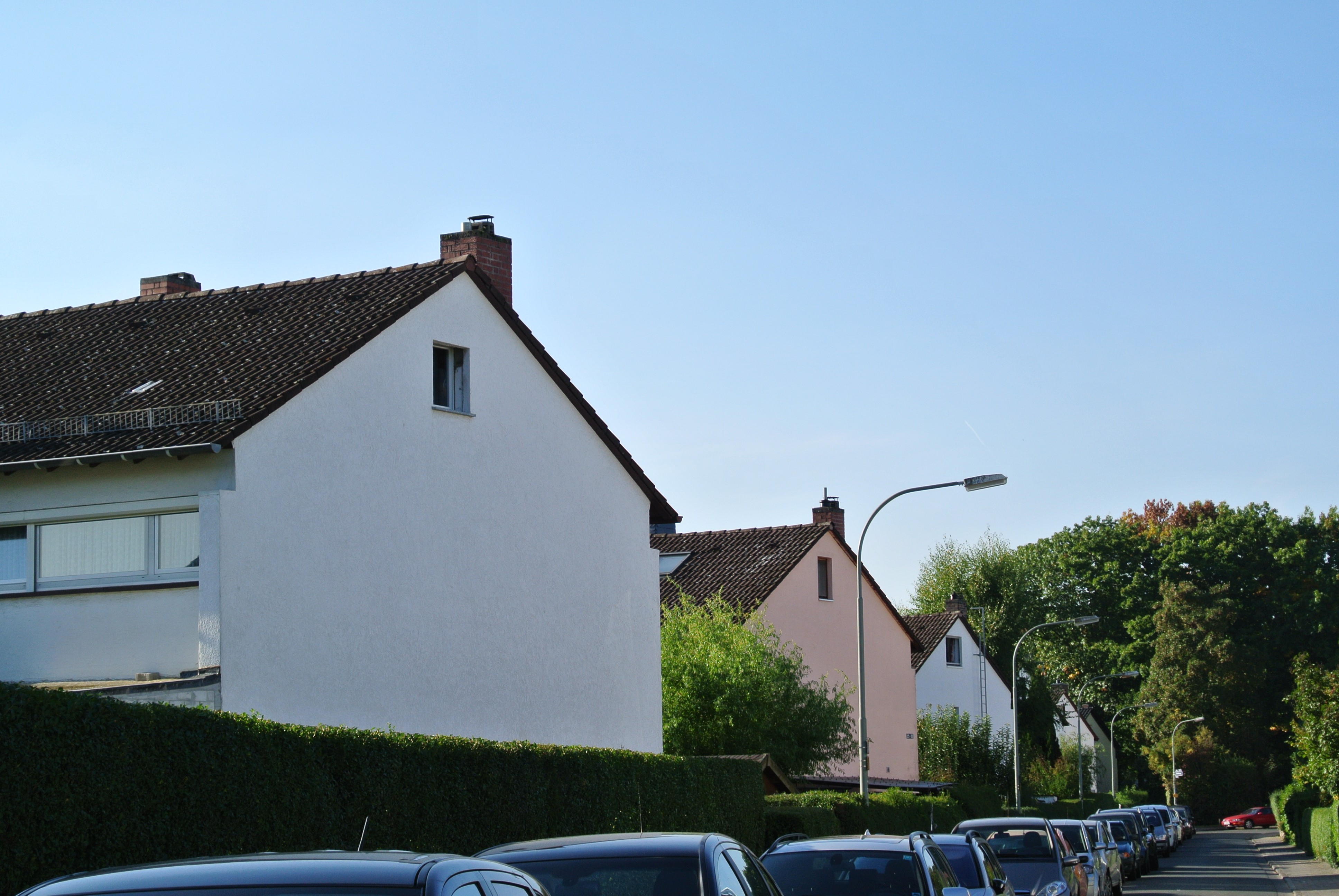 Siedlung Frankfurter Berg, Bebauung aus den 1950er Jahren, Holunderweg